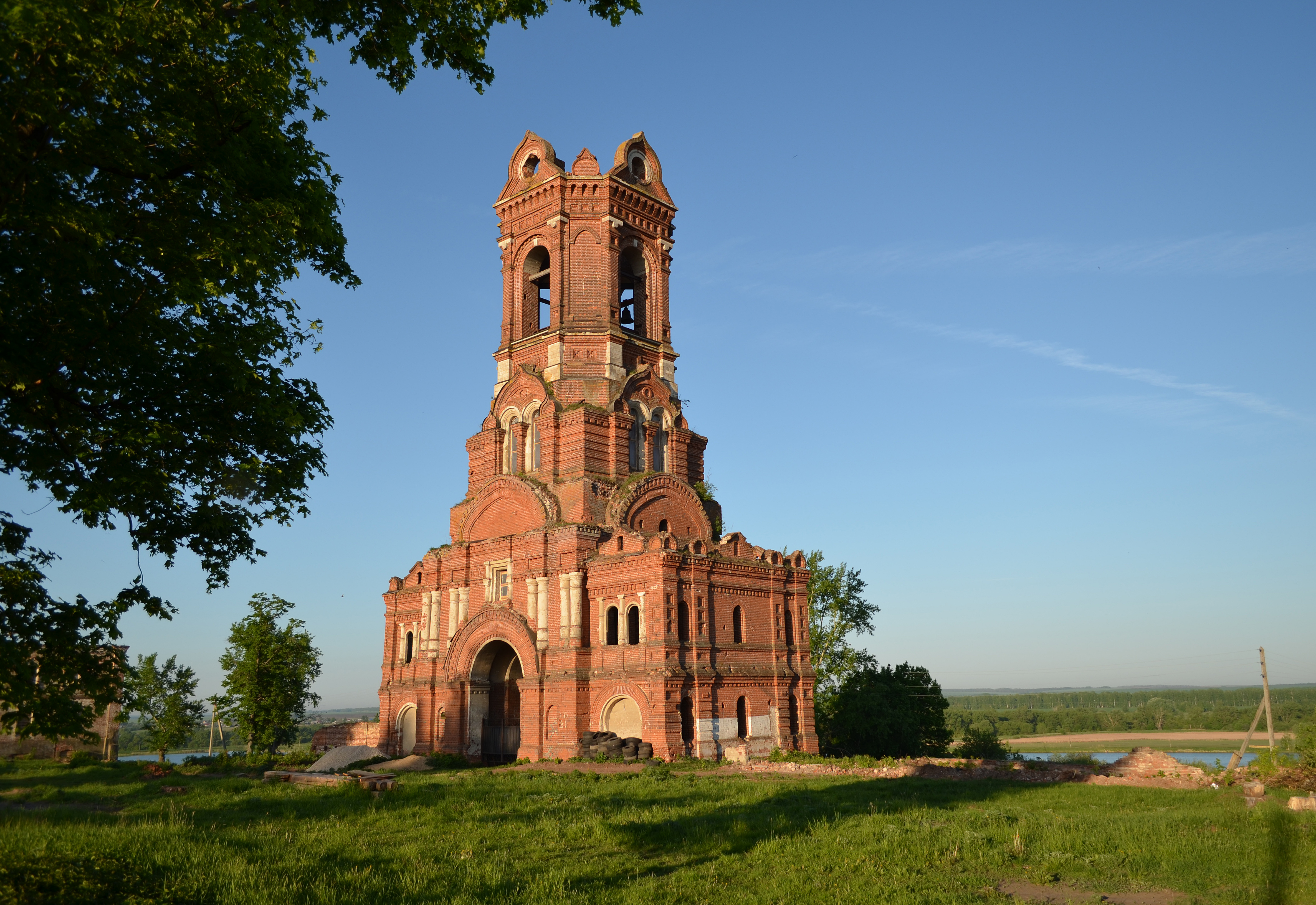 Рязанская область.Сараевский район.Посёлок Заря Свободы.Николо-Бавыкинский мужской монастырь.Колокольня(1910).